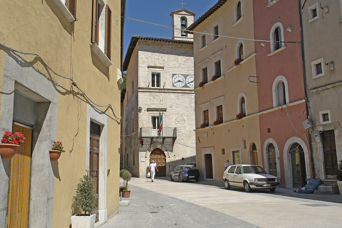 Visso, Palazzo dei Priori, sede del Municipio.